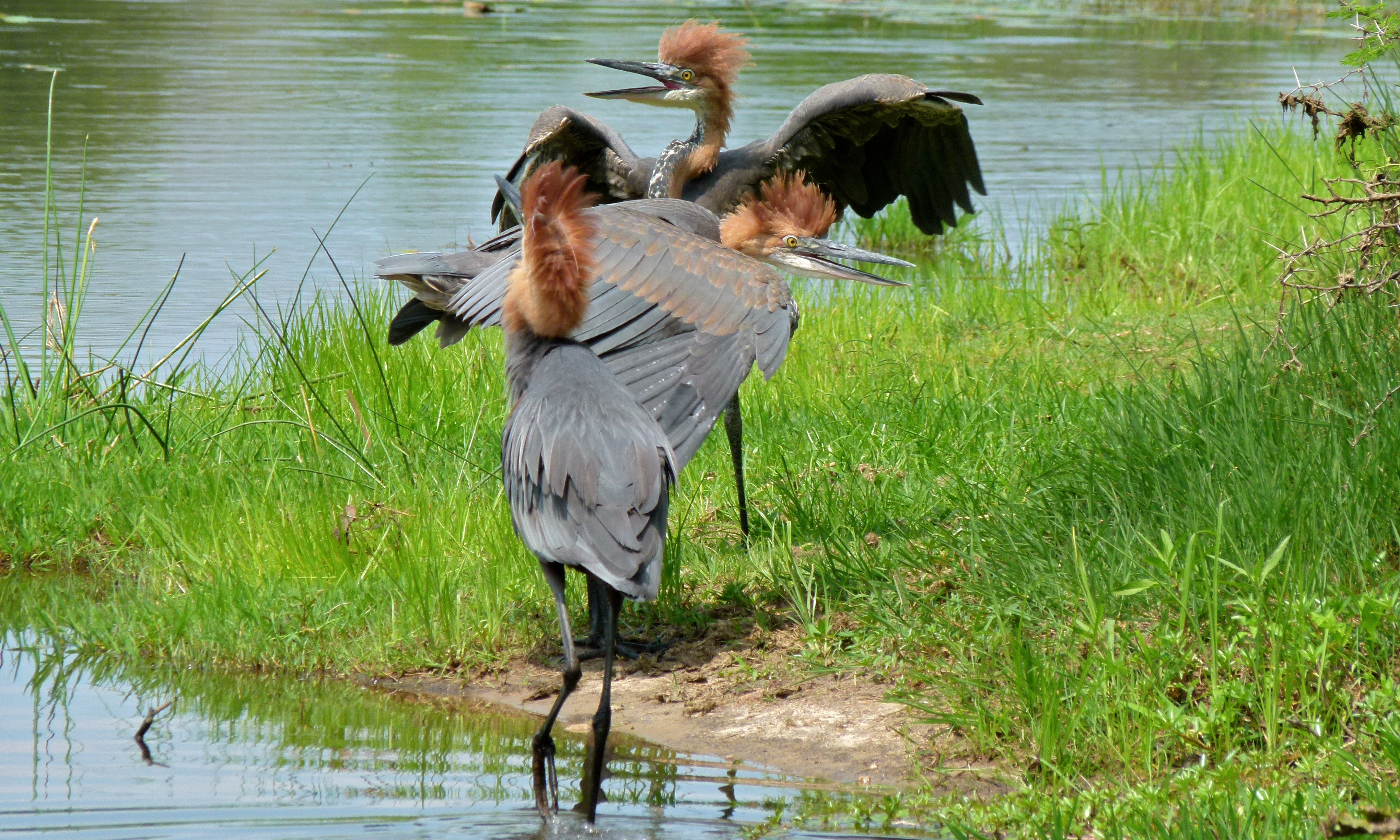 Lake Panic Hide near Skukuza, Kruger NP, SOUTH AFRICA